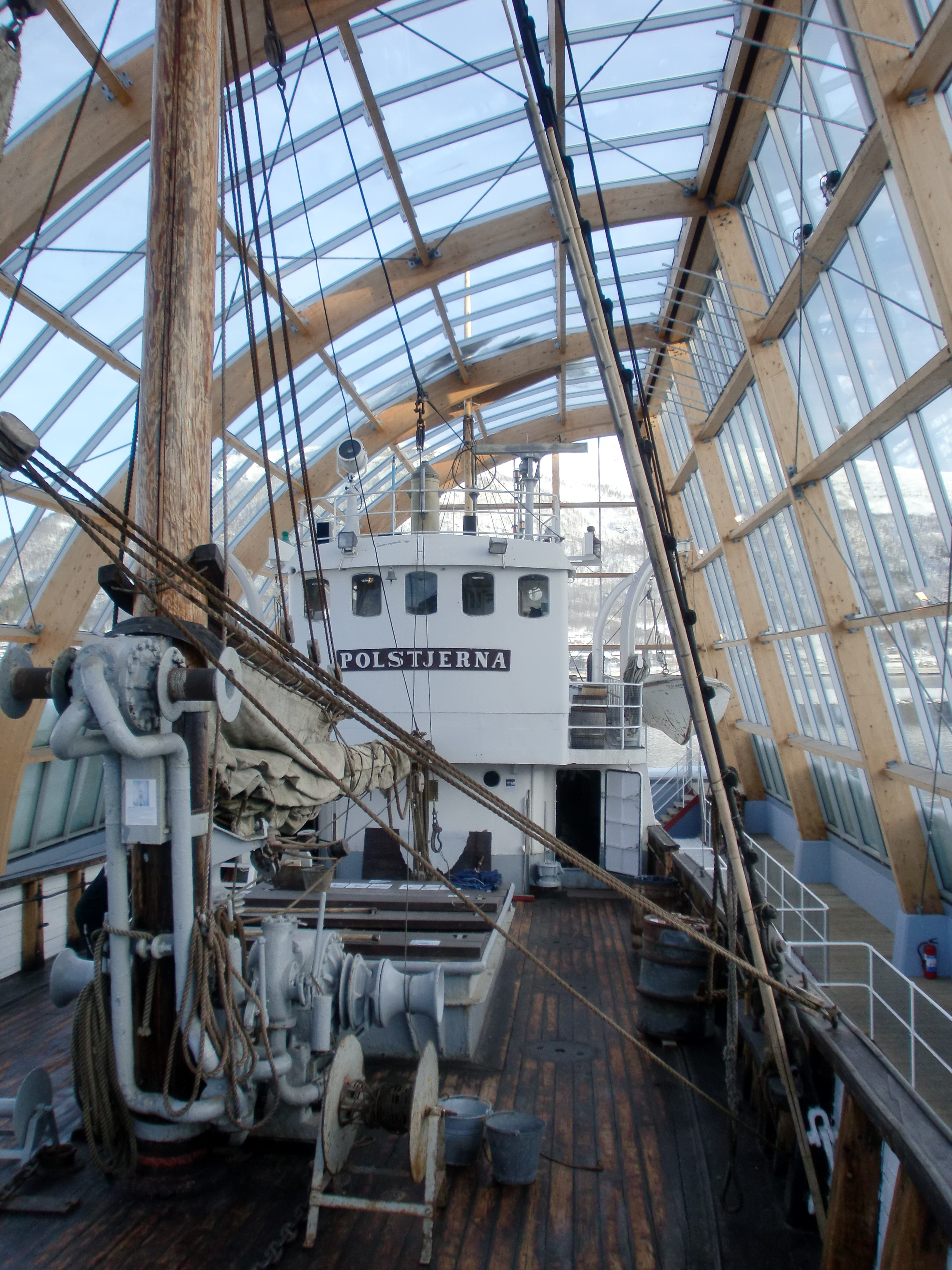 MS Polstjerna, Tromsø